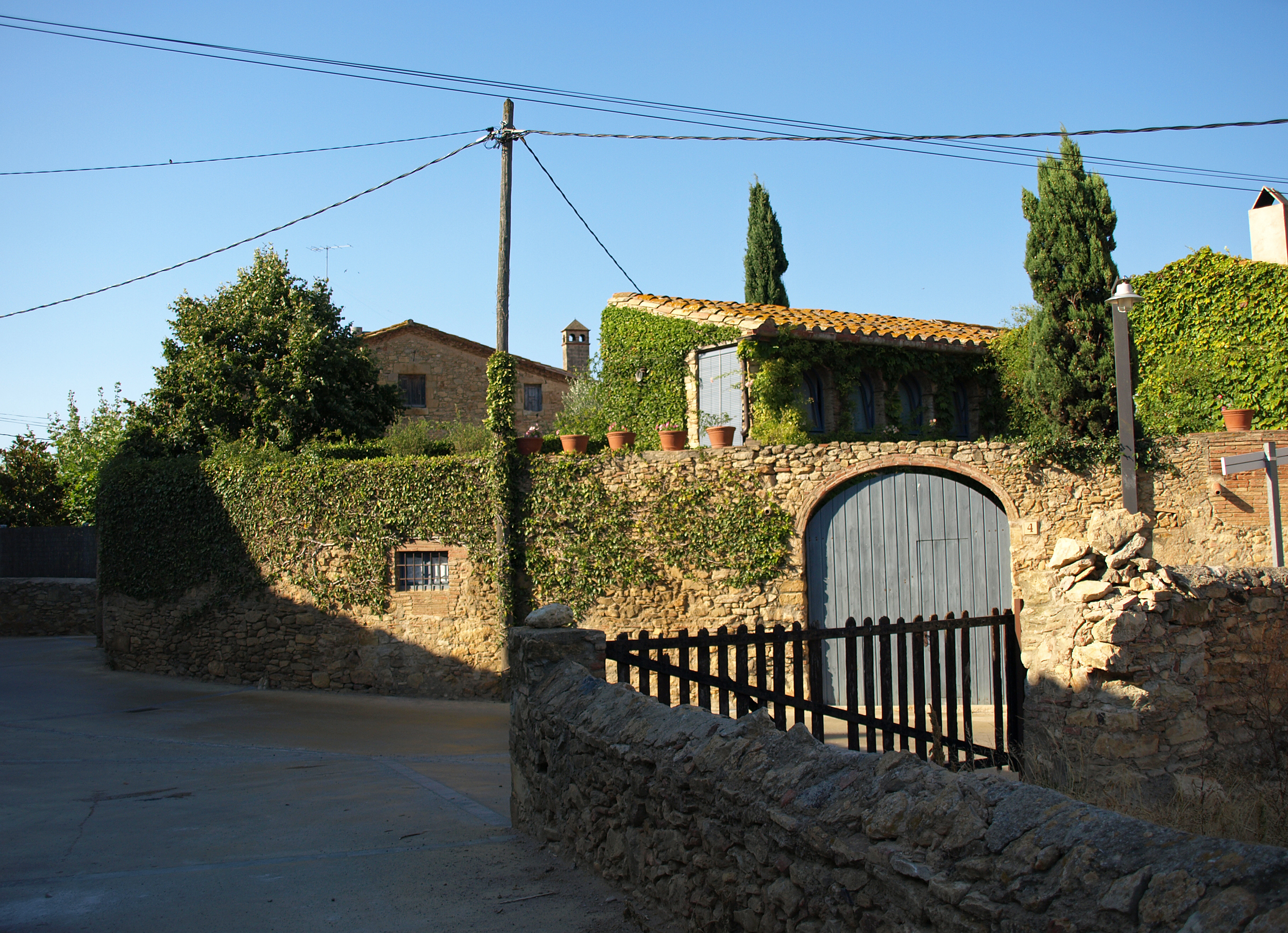 Fontclara, entidad población perteneciente a Palau-sator, ubicada en el Bajo Ampurdán (Cataluña, España).